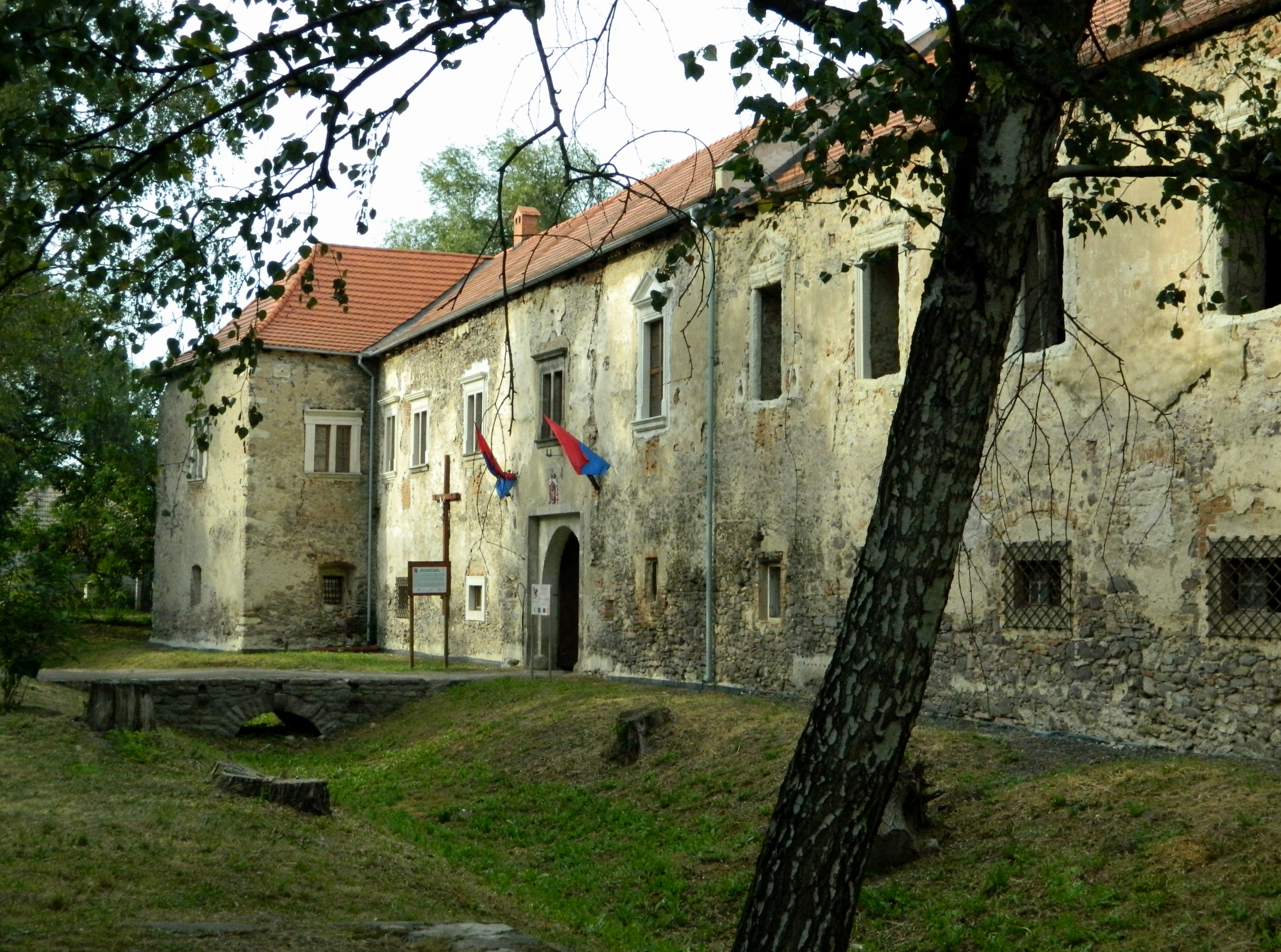 Kaštieľ